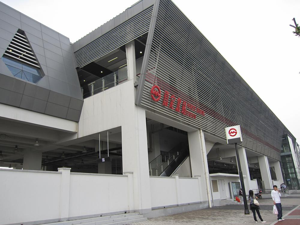 description